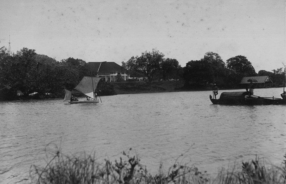 കൊല്ലത്തെ ആശ്രാമത്തിലെ ഗസ്റ്റ് ഹൗസും ബ്രിട്ടീഷ് റസിഡൻസിയും